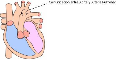 persistent ductus